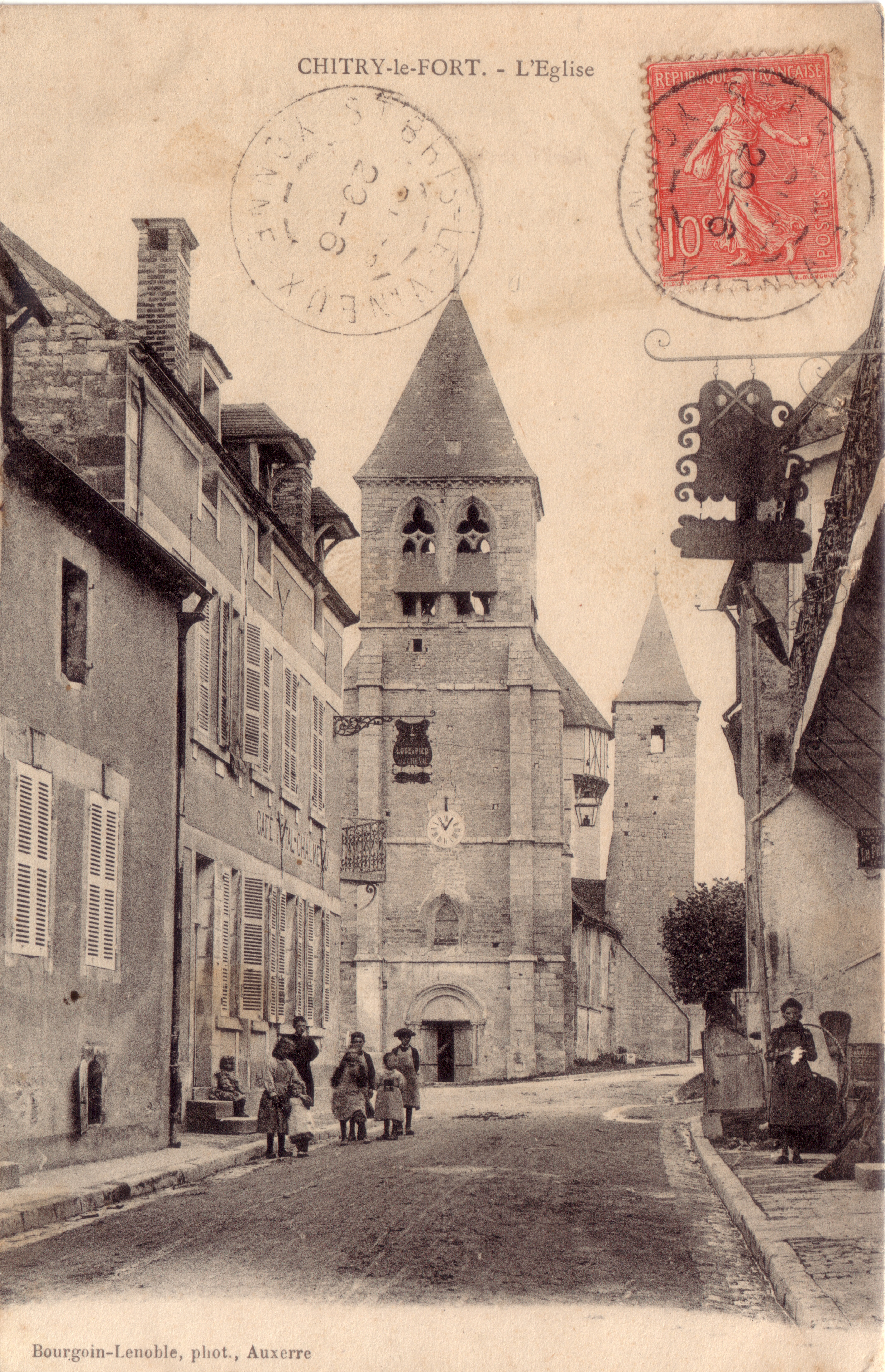 Chitry le fort et son église vue de la grande rue